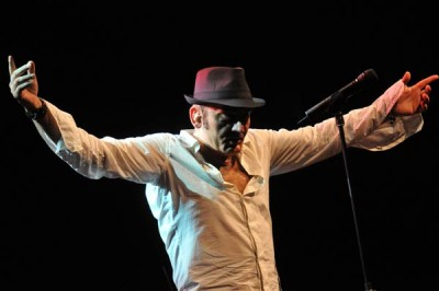 Mango a Padova.jpg